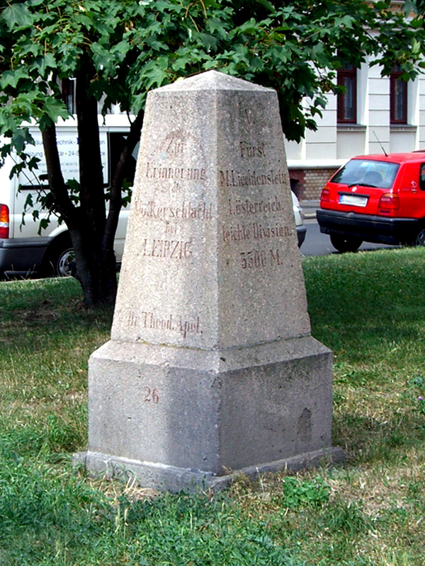 Apelstein Nr. 26 zur Erinnerung an Moritz Fürst von Liechtenstein in der Völkerschlacht bei Leipzig